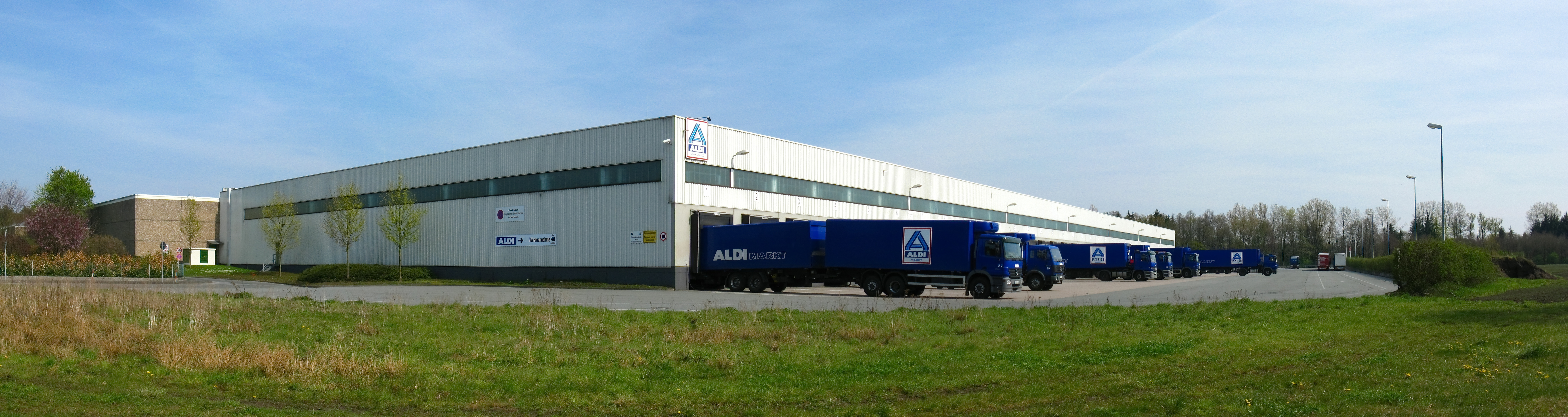 Zentrallager von Aldi-Nord im Schloß Holter Ortsteil Liemke